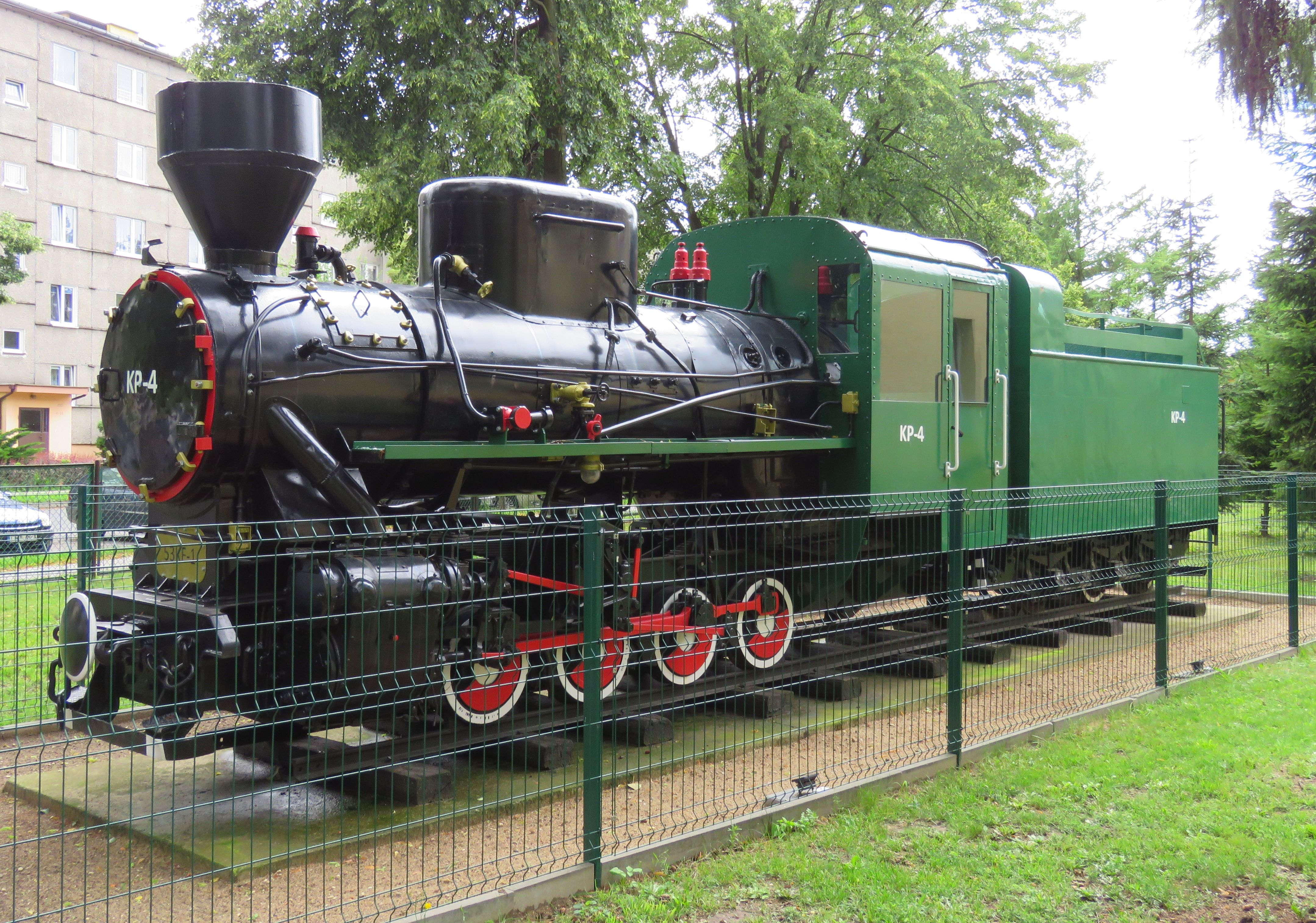 Kolej wąskotorowa